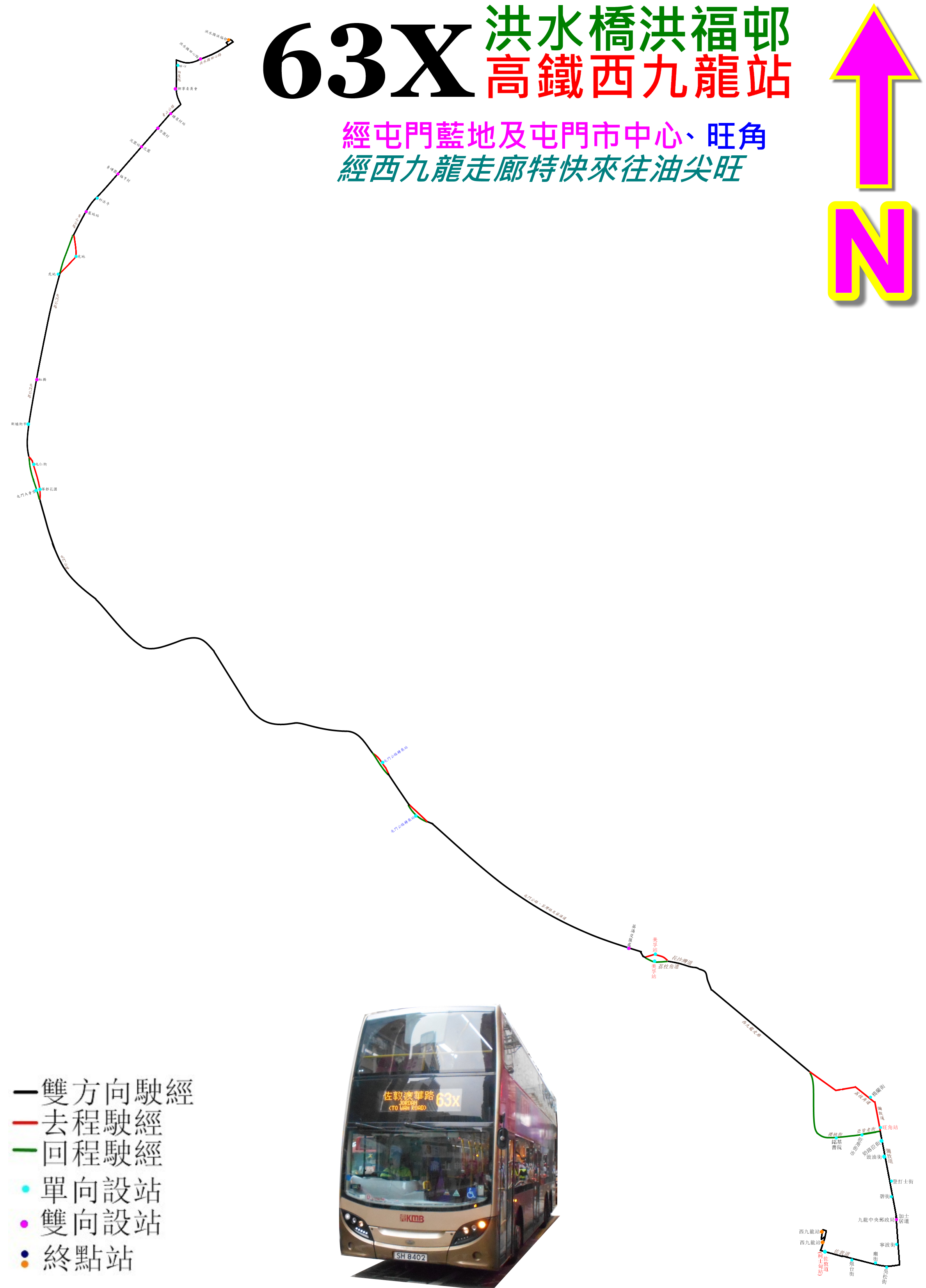 中文（香港）: 九巴63X線的走線圖，清晨及深夜往洪水橋的班次改行深藍色的路段